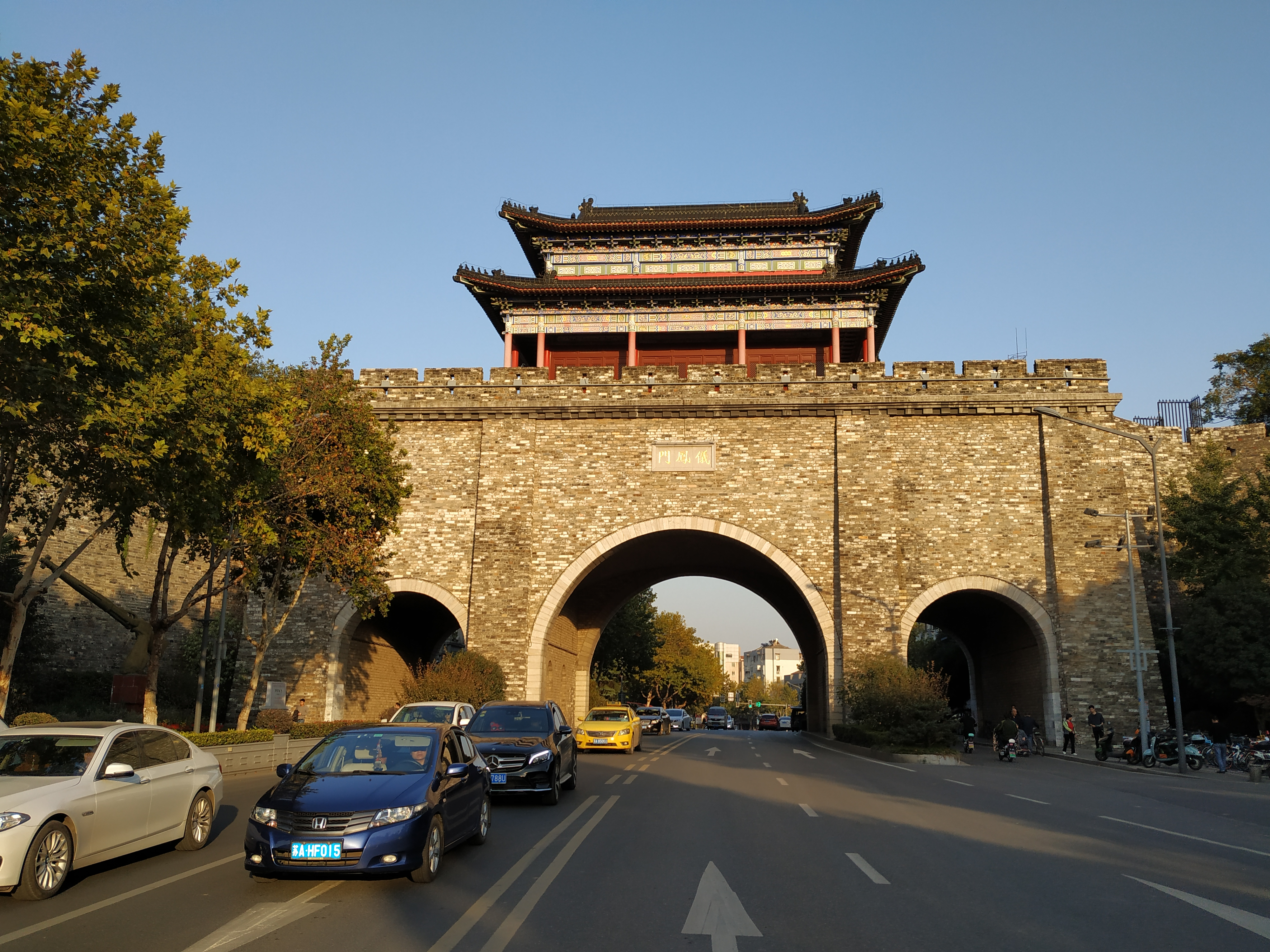 中文（中国大陆）: 南京城墙仪凤门